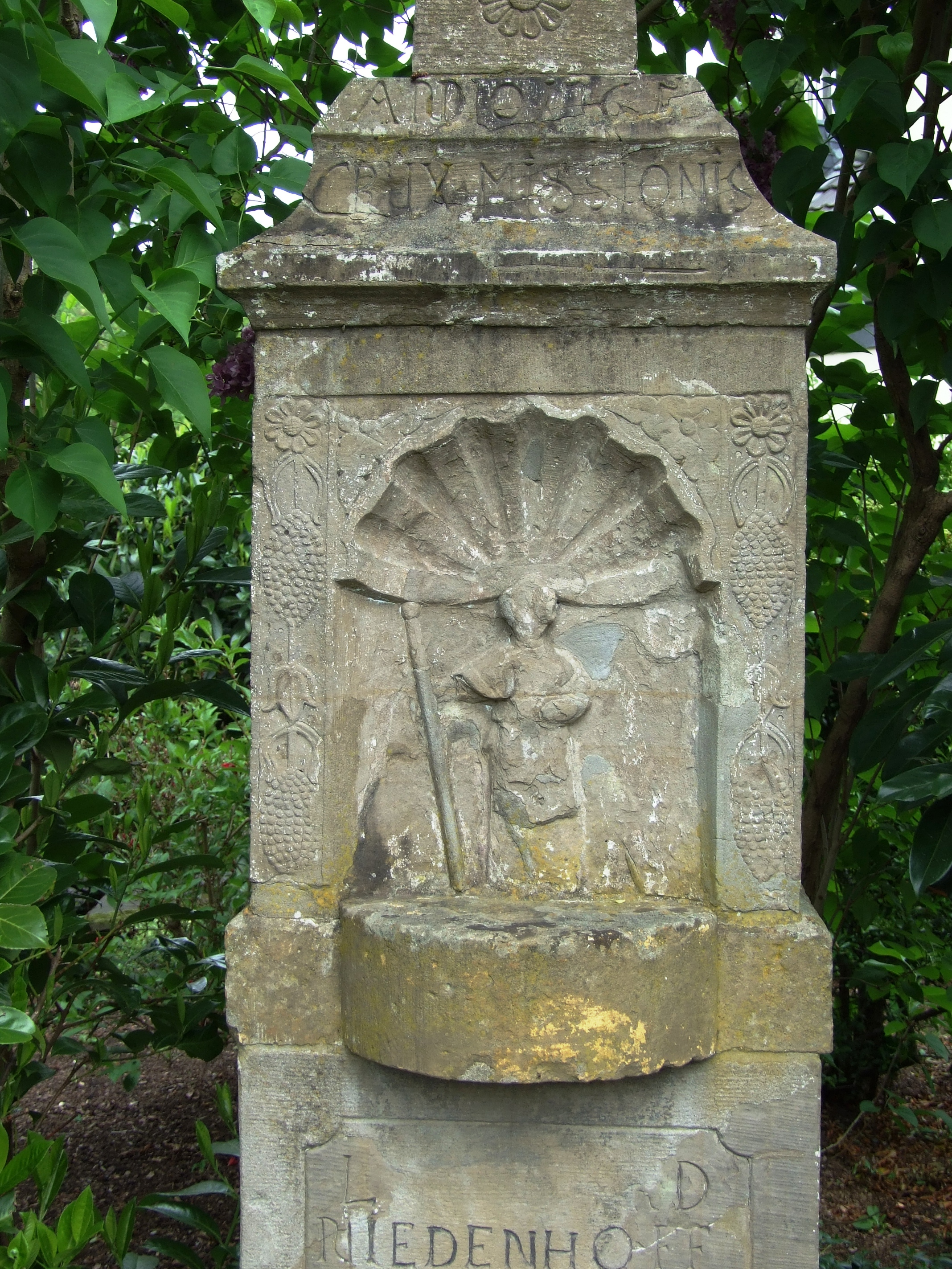 Bergisch Gladbach, Denkmal Nr. 34, Detail